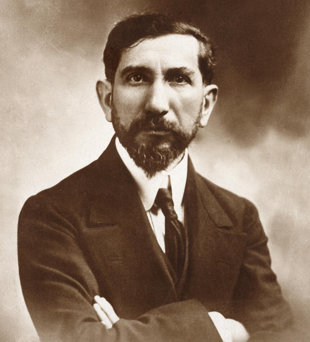 Charles Maurras photographié par Pierre Petit.